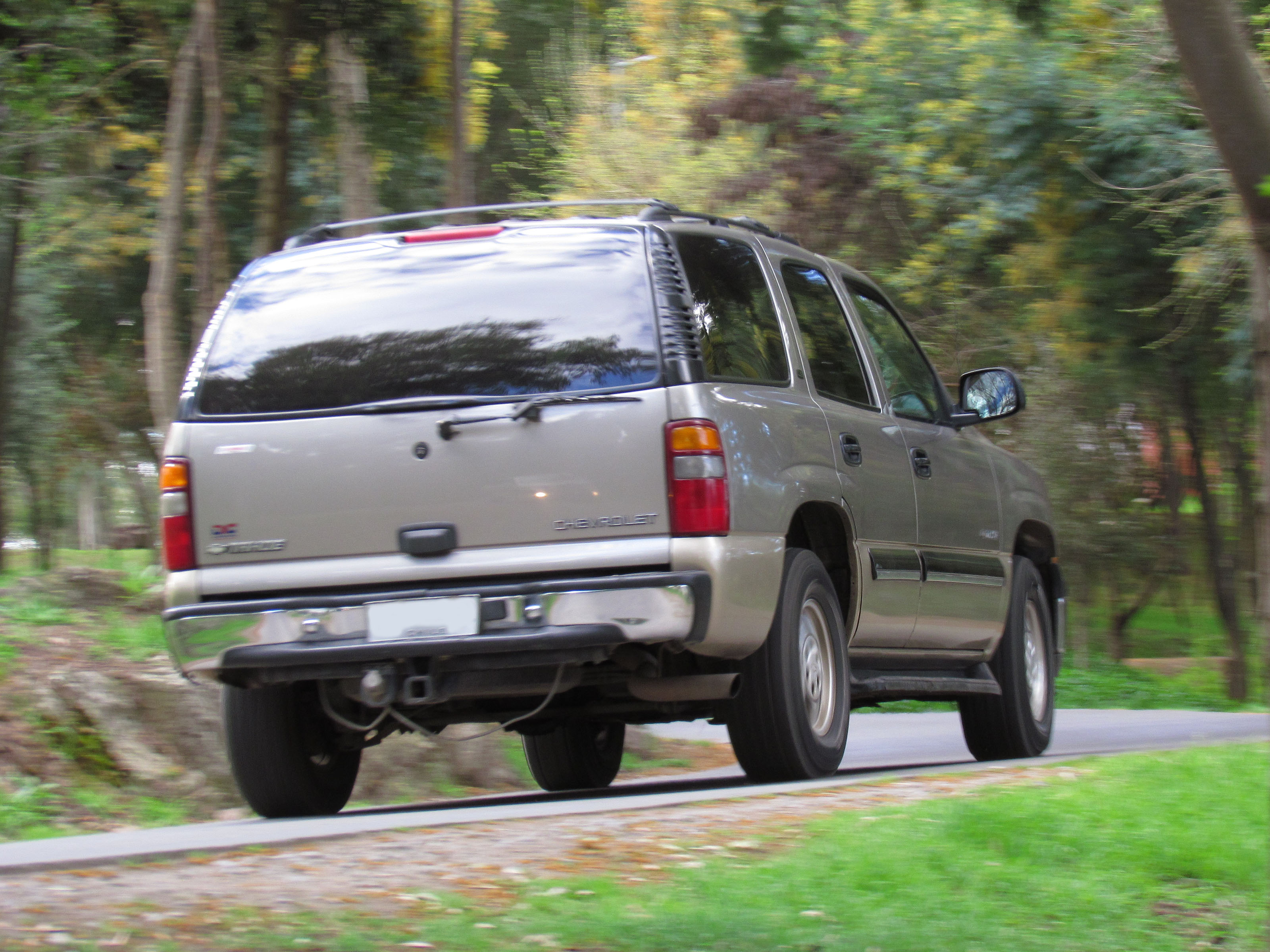 Chevrolet Tahoe LS 2002